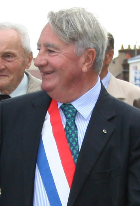 Jean-Pierre Soisson, le 24 août 2006 lors des commémorations du 62é anniversaire de la libération d'Auxerre. À sa gauche, l'actuel maire d'Auxerre (2001-2009), Guy Ferez. (Gérald MERCIER, L’indépendant de l’Yonne, édition du Vendredi 25 août 2006).